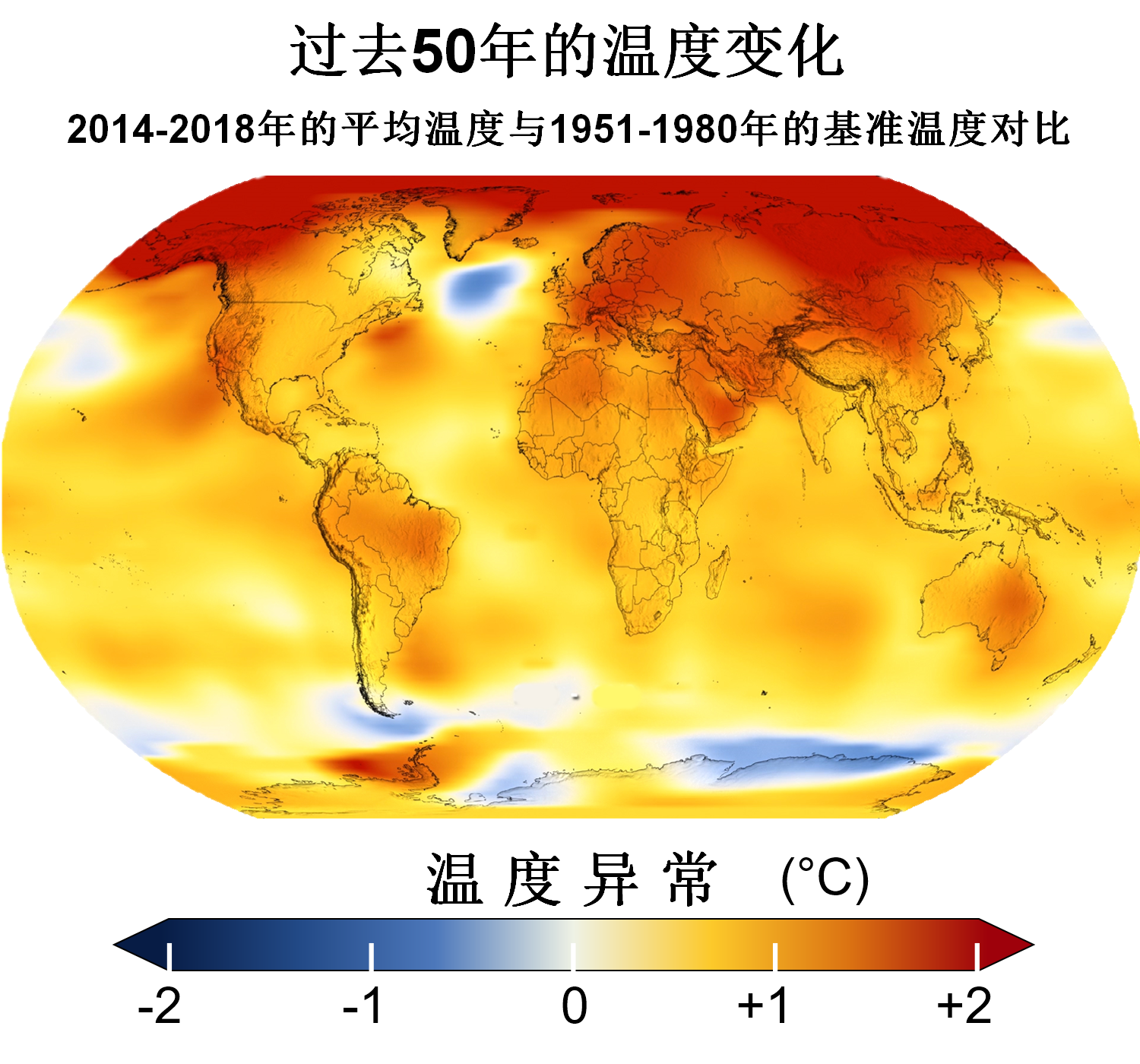 中文（中国大陆）: 2014-2018年全球平均温度与1951-1980年基准温度对比，翻译自维基英文版本。